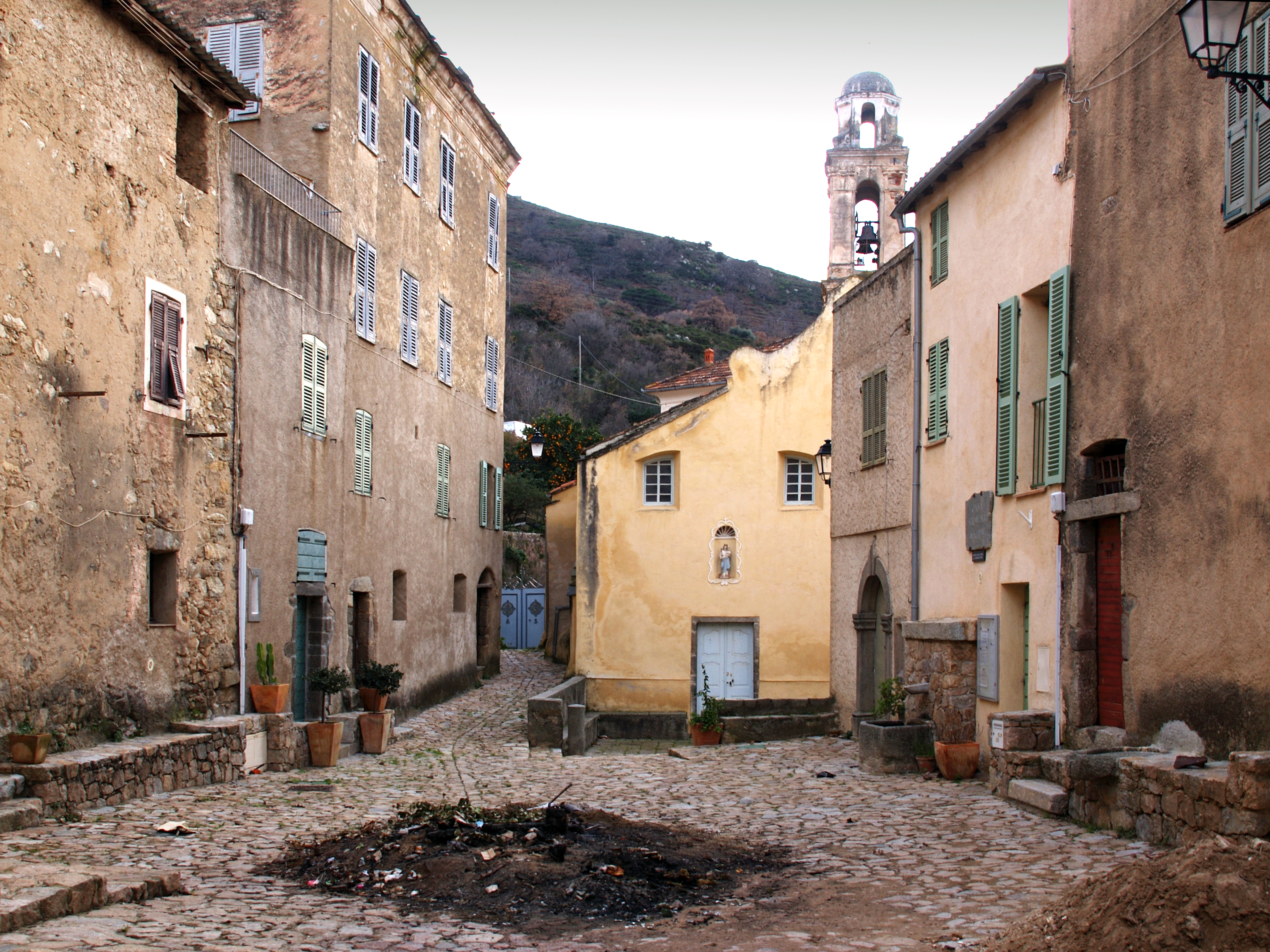 Corsu: A Costa, Balagne (Corsica) - U fucone nantu à a Piazza di a ghjesgia